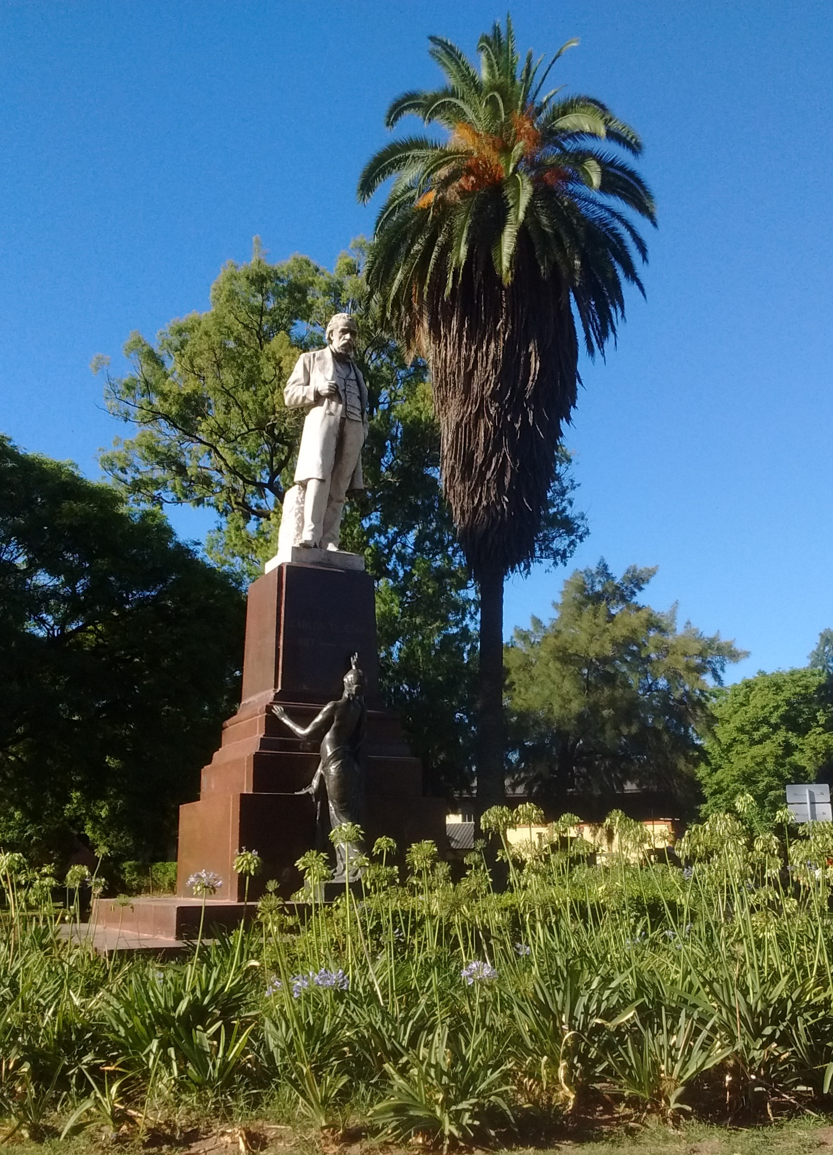 Monumento a Carlos Tejedor y La Historia por Lucio Correa Morales. Se inauguró en 1909. Parque Tres de Febrero, Plaza Sicilia, Buenos Aires, Argentina.